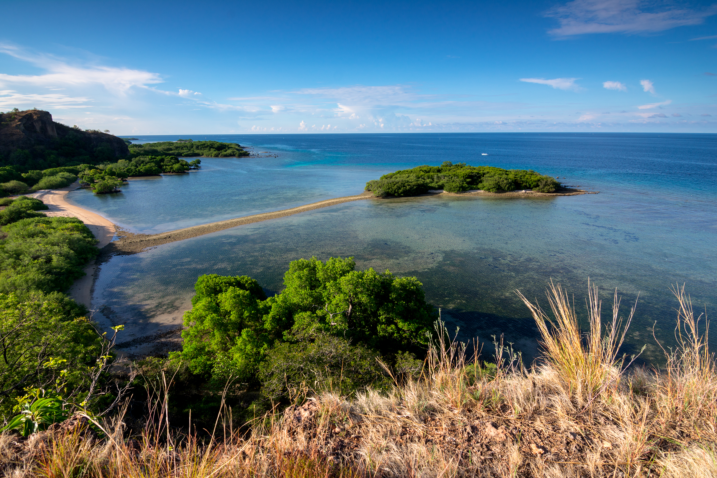 Pantai balanan dilihat dari bukit balanan Taman nasional baluran